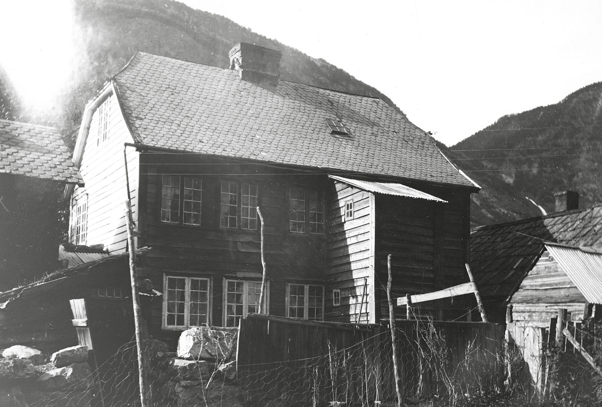 Synneva Eris hus, Husfred, Lærdal.